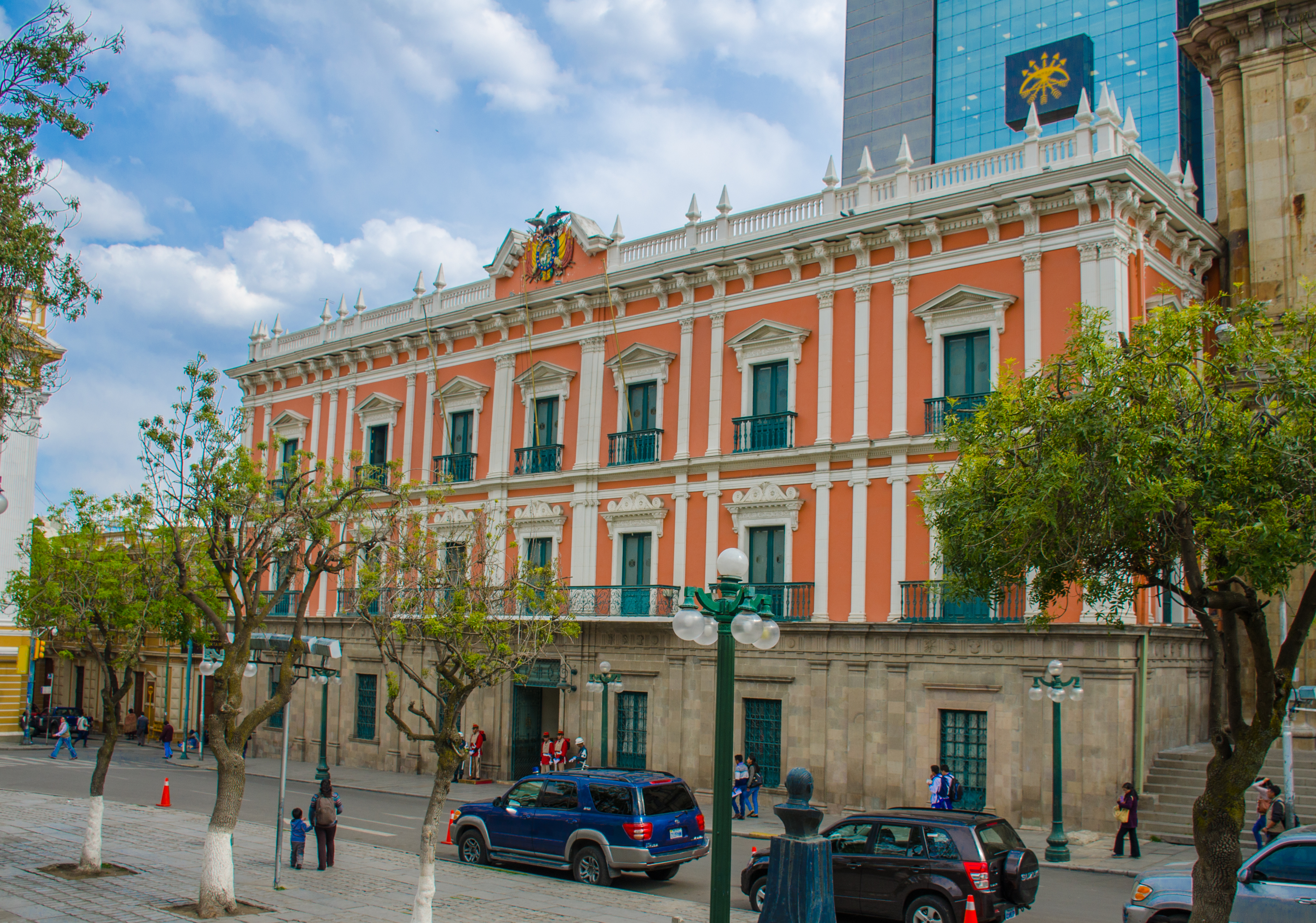 Palacio de Gobierno, Palacio Quemado This medium shows the protected monument with the number L/00-078 in Bolivia.